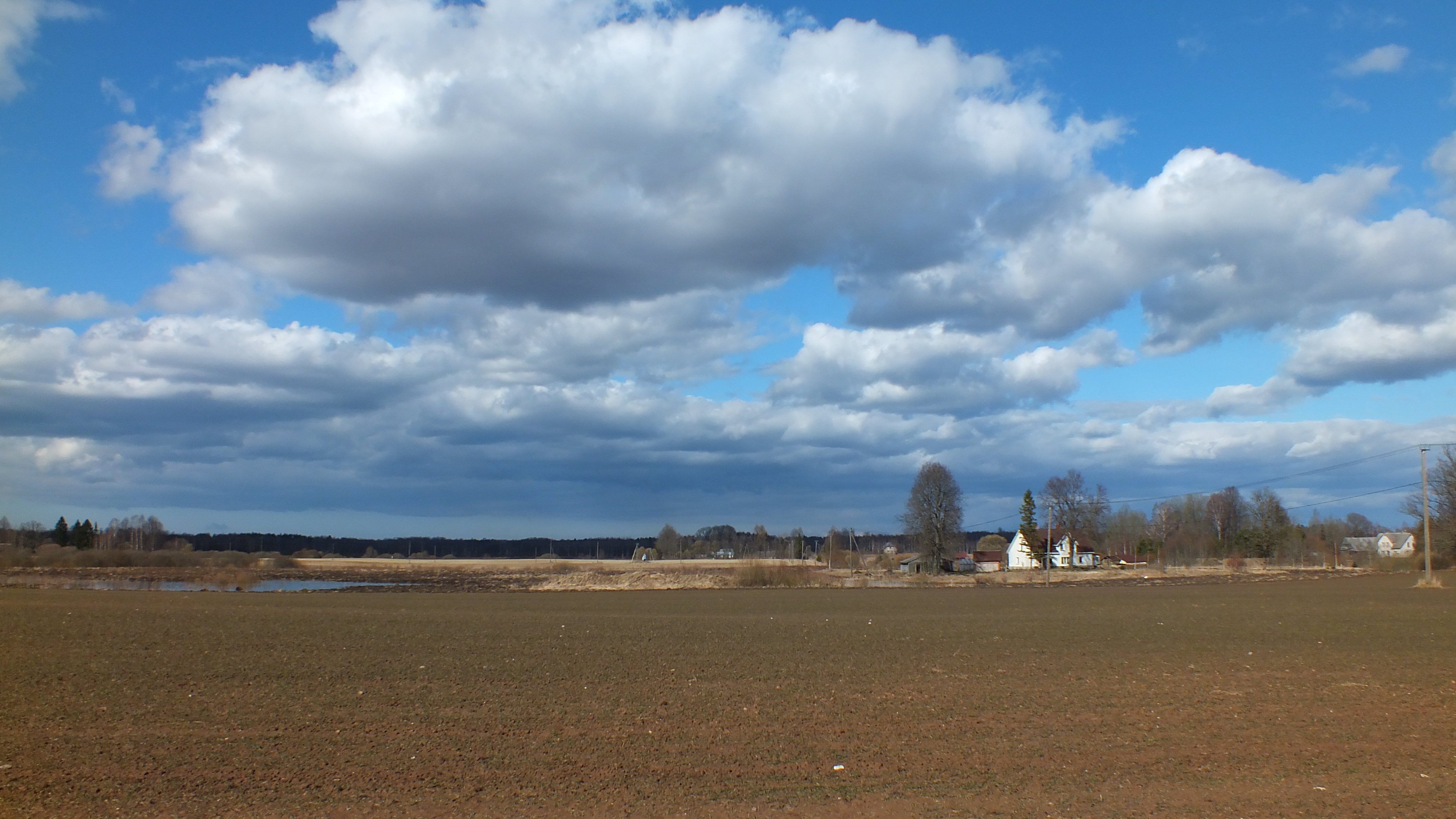 Umpārtes ainava